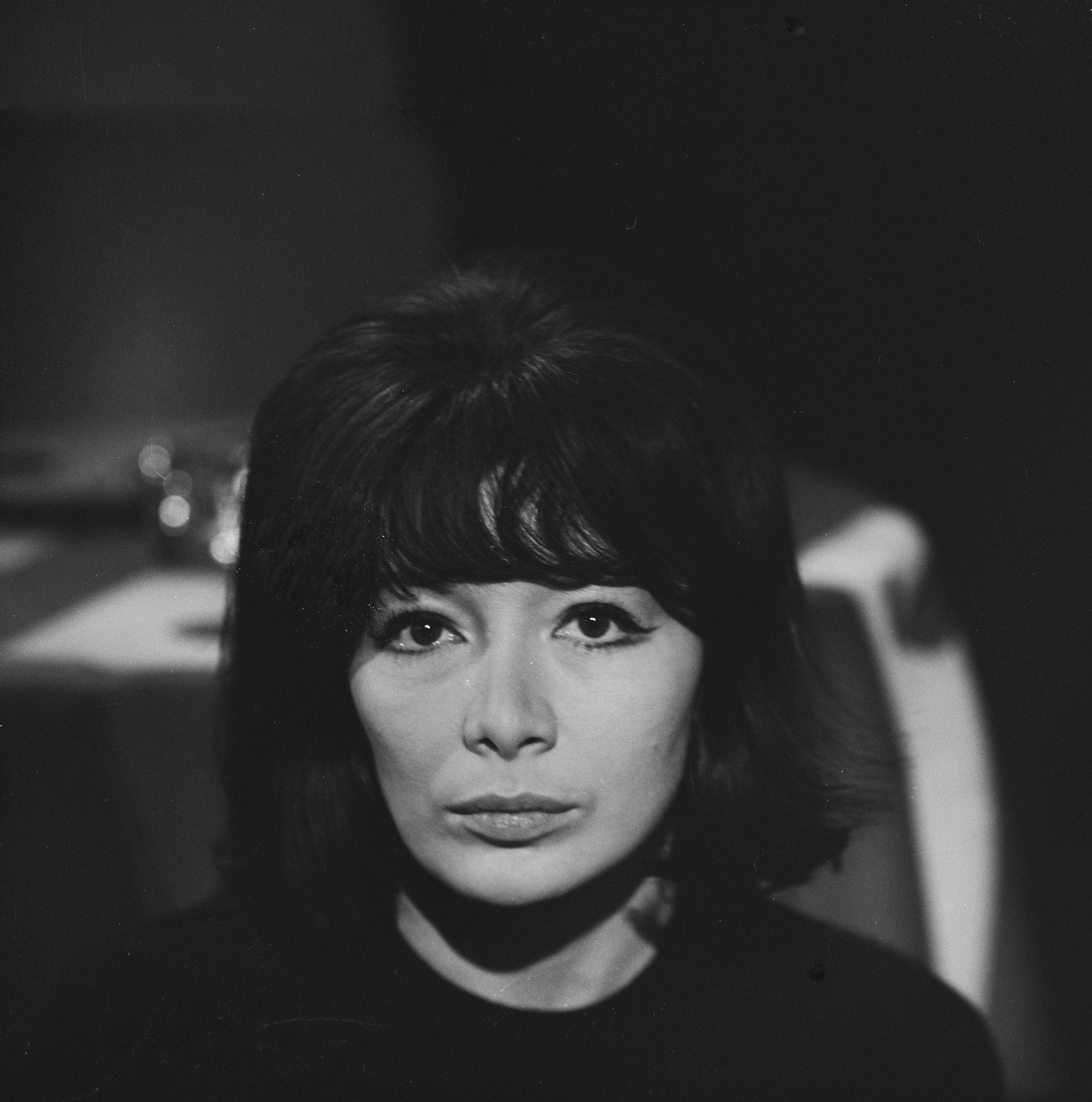 Collectie / Archief : Fotocollectie Anefo Reportage / Serie : [ onbekend ] Beschrijving : Juliette Greco voor het programma "Domino" in de Cinetone Studio in Duivendrecht Datum : 21 maart 1963 Locatie : Duivendrecht, Noord-Holland Trefwoorden : zangeressen Persoonsnaam : Greco, Juliette Fotograaf : Nijs, Jac. de / Anefo Auteursrechthebbende : Nationaal Archief Materiaalsoort : Negatief (zwart/wit) Nummer archiefinventaris : bekijk toegang 2.24.01.03 Bestanddeelnummer : 914-9574 Reacties Geplaatst door Maaike op 02 oktober 2013 - 03:01. NB. Ze kijkt teleurgesteld omdat zij haar stem verloor tijdens de opname